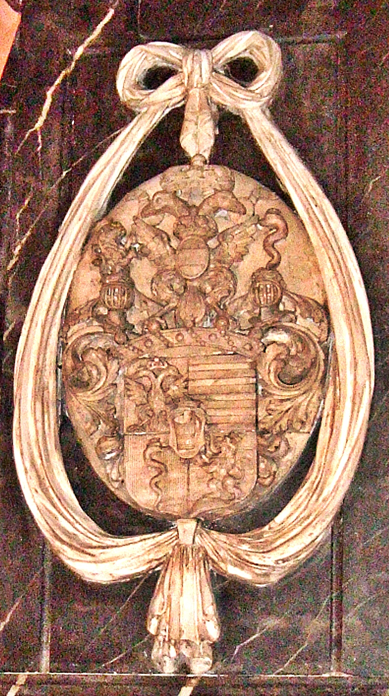 Wappen der Freiherrn von Brentano-Cimaroli, vom Epitaph Generals Anton Joseph von Brentano-Cimaroli (1741-1793), im Dom zu Frankfurt